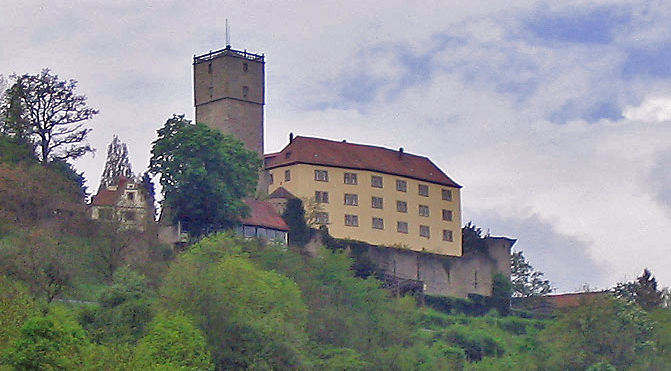 Buerg Guttenberg am Mee 2005